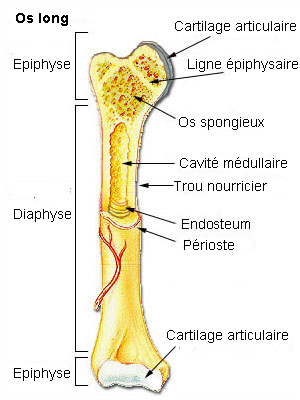 Bone